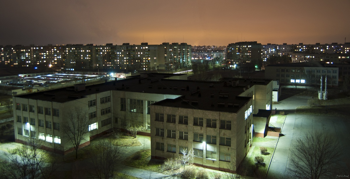 Новые районы